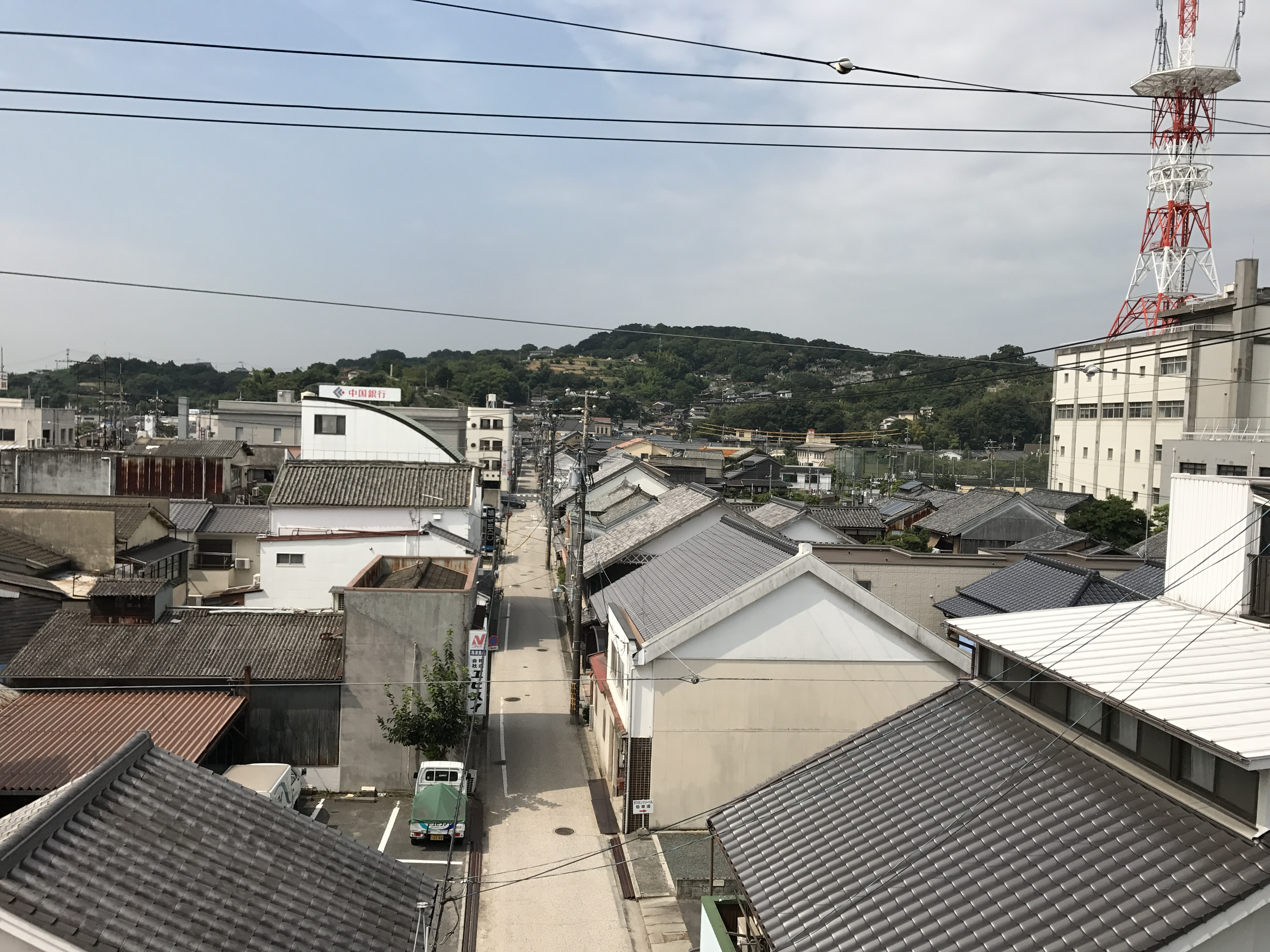 羽黒神社会館の上から見た新町の風景